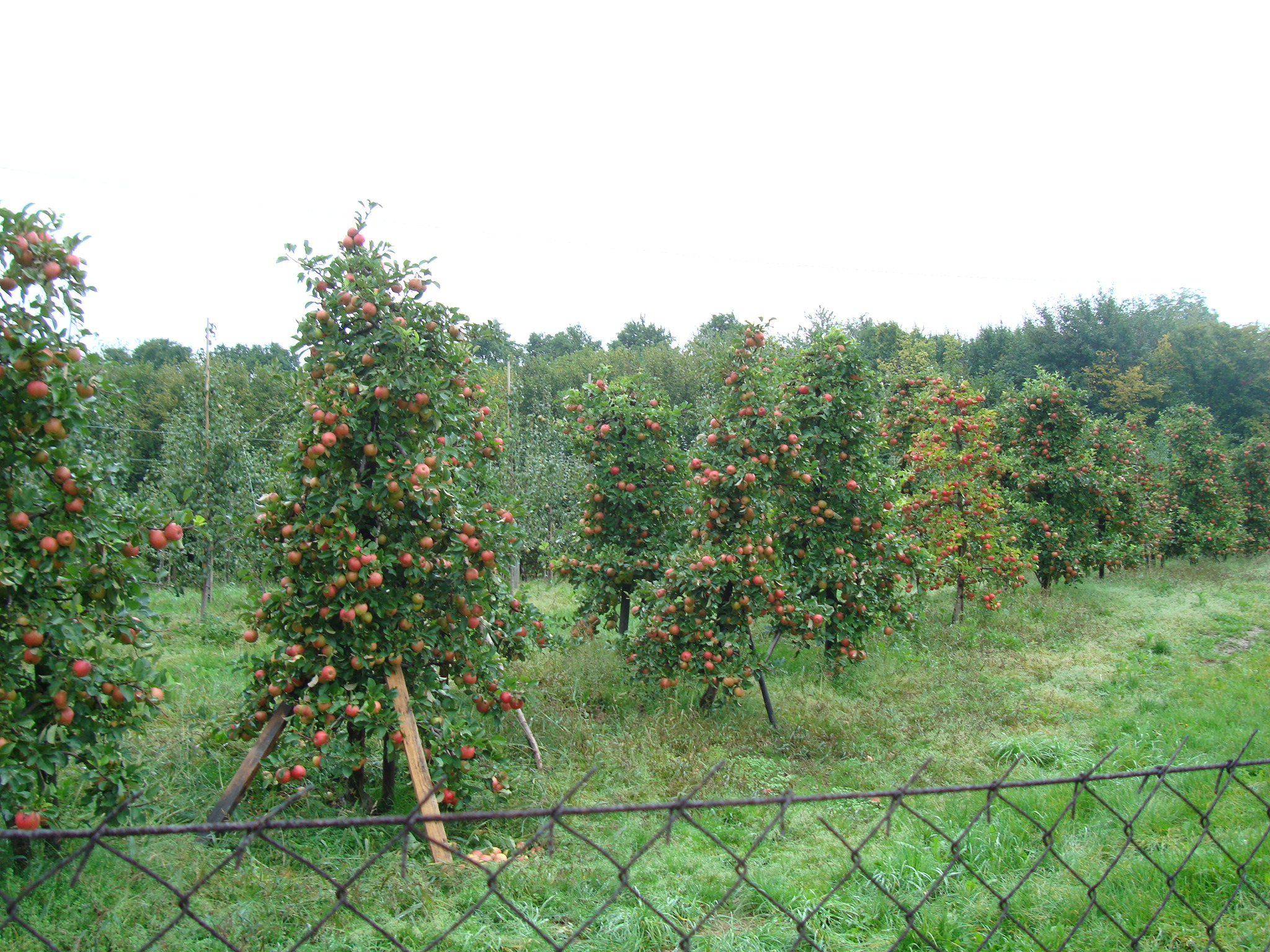 Sady owocowe w Lisowie (podkarpackie)